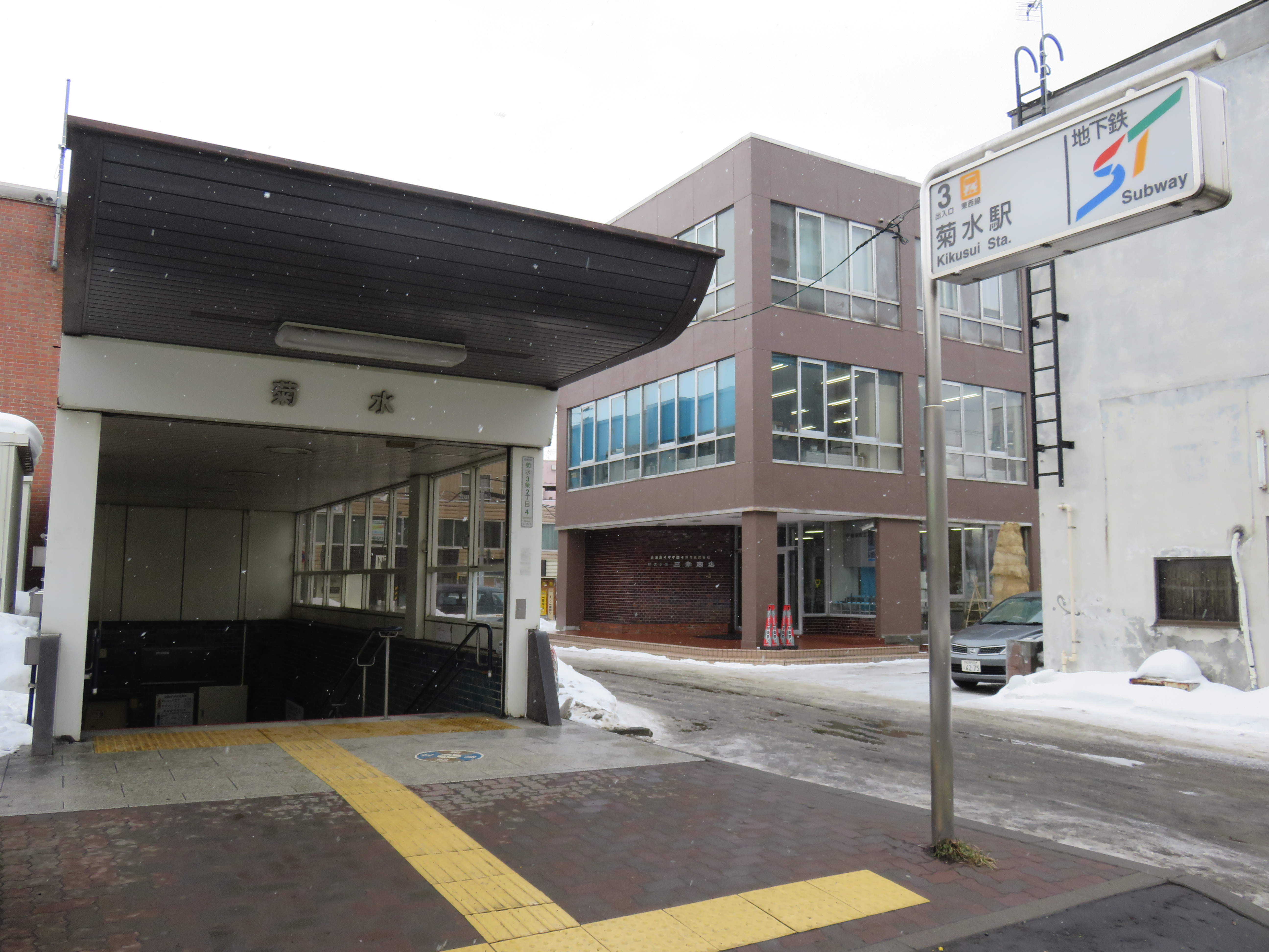 菊水駅3番出入口